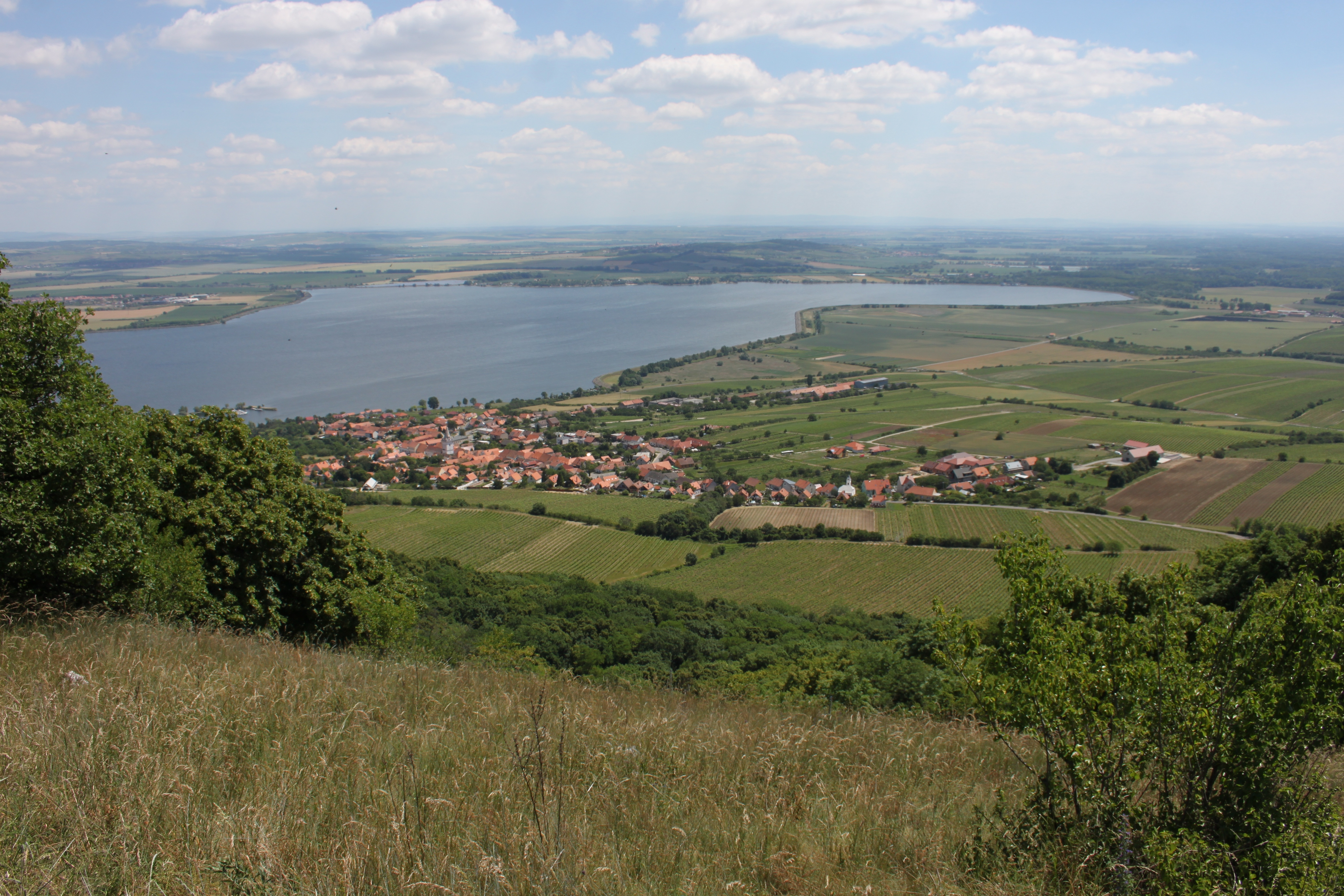 Pohled na Novomlýnskou nádrž ze svahů Děvína